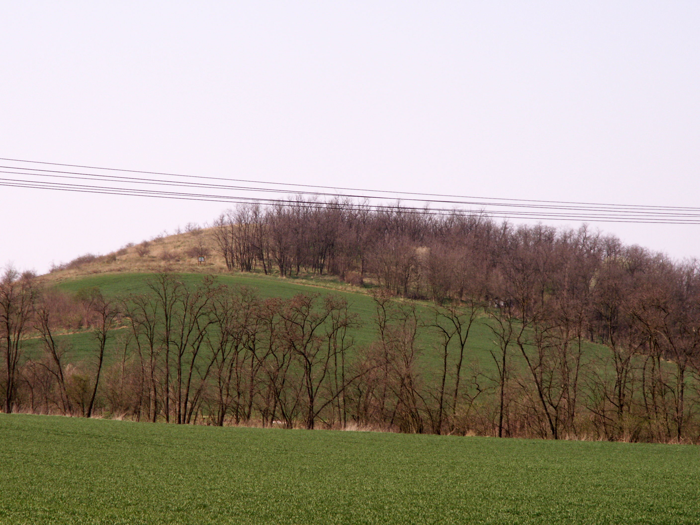 přírodní památka ev. č. 891, katastrální území Letkovice ve městě Ivančice v okrese Brno-venkov